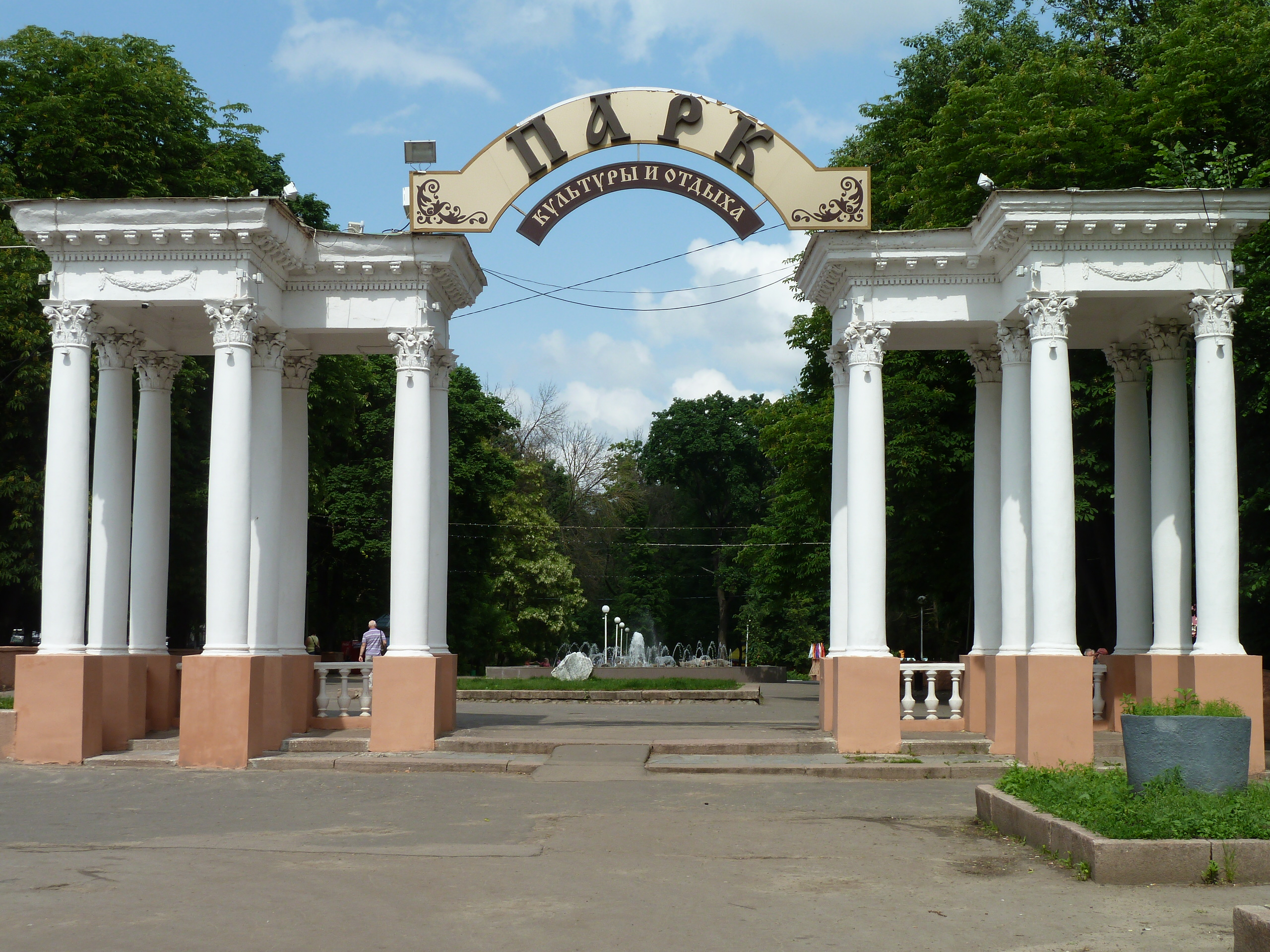 Центральный вход в парк